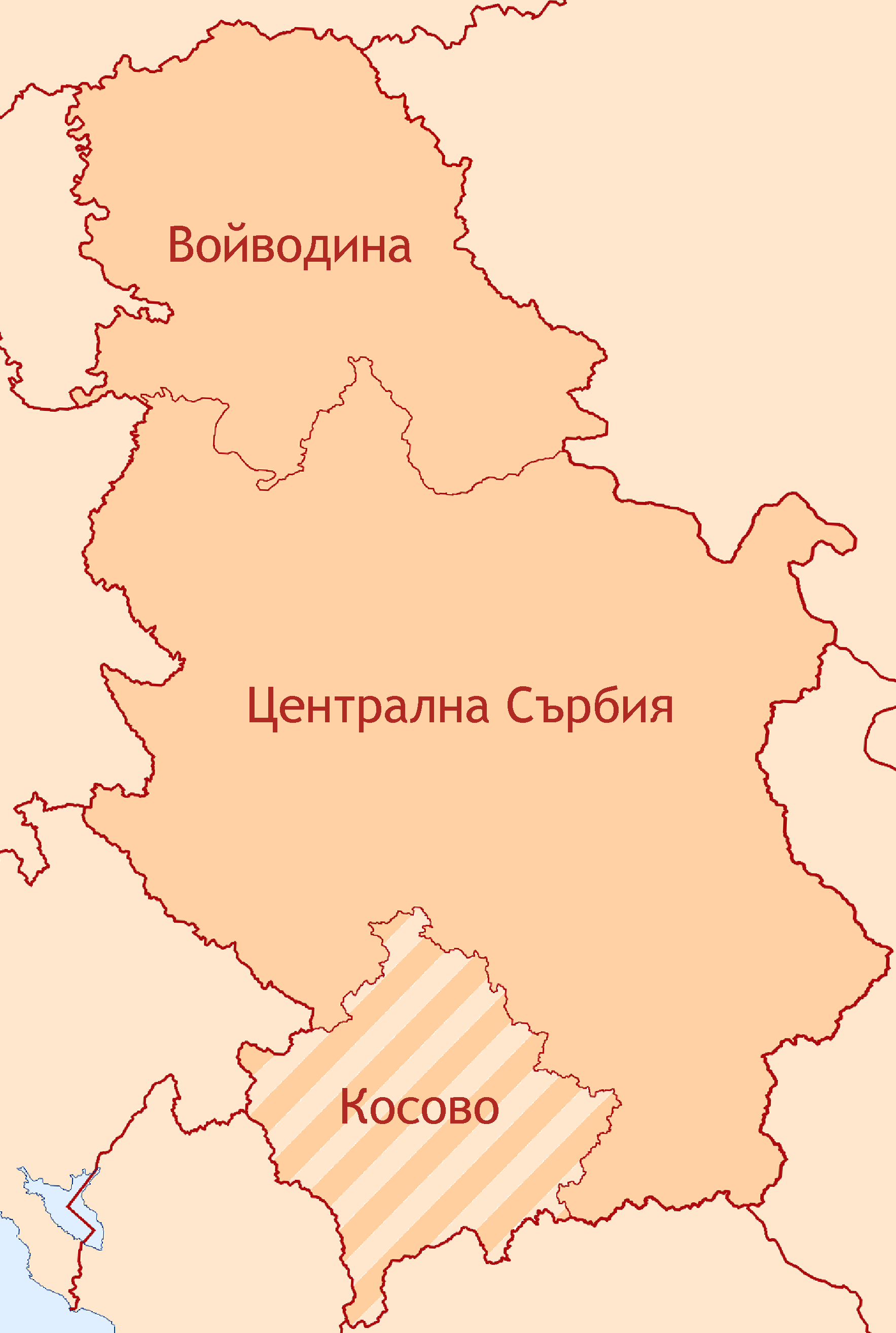 Карта на Сърбия